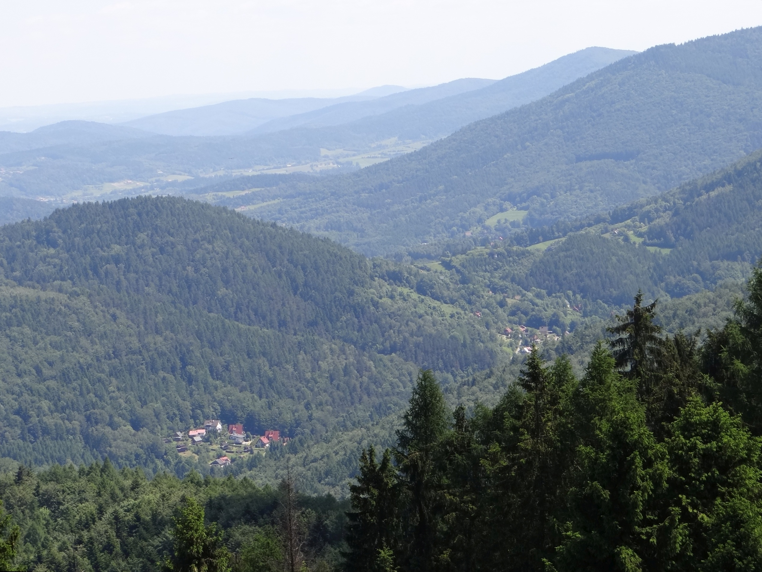 Przełęcz Targanicka. Widok z Kiczery